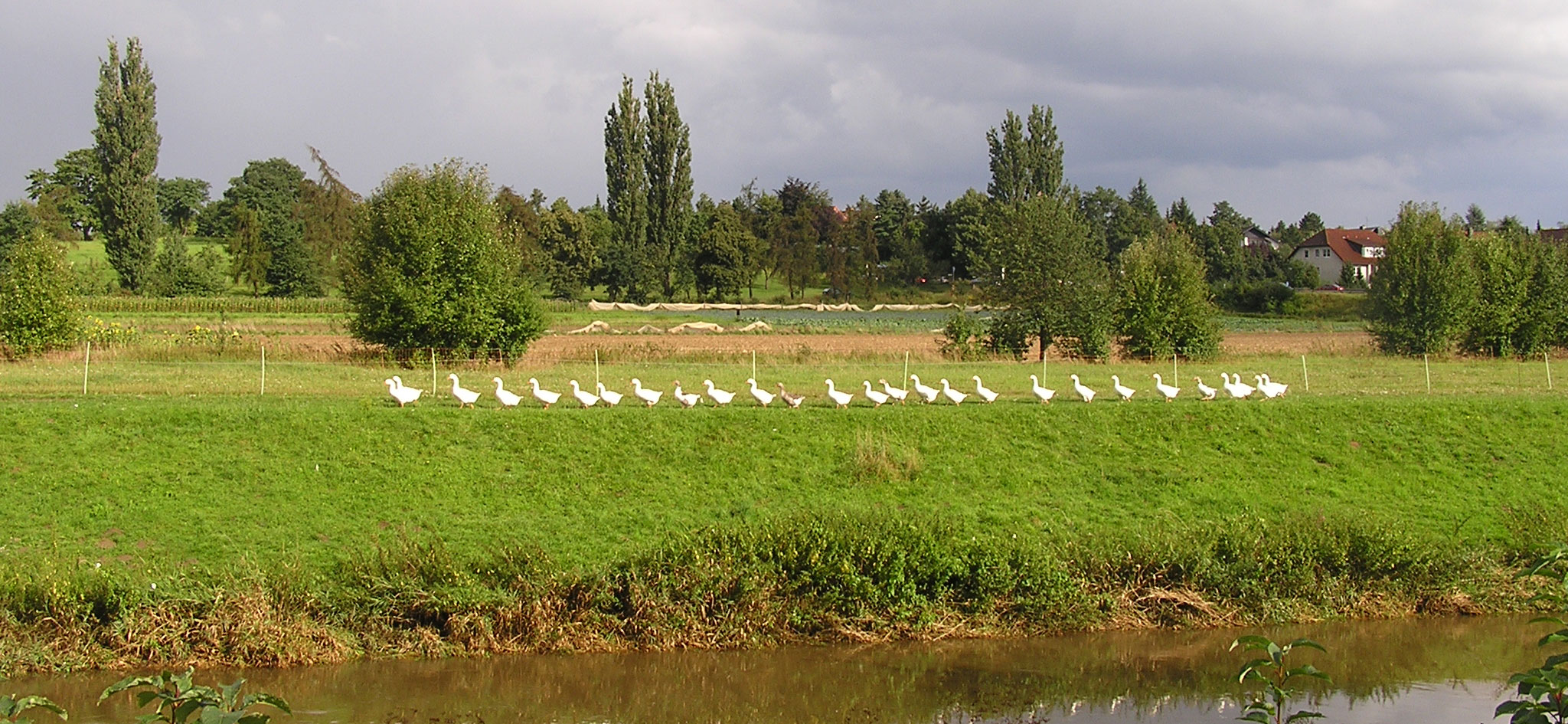 Gänsemarsch